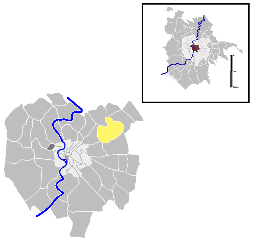 Pietralata